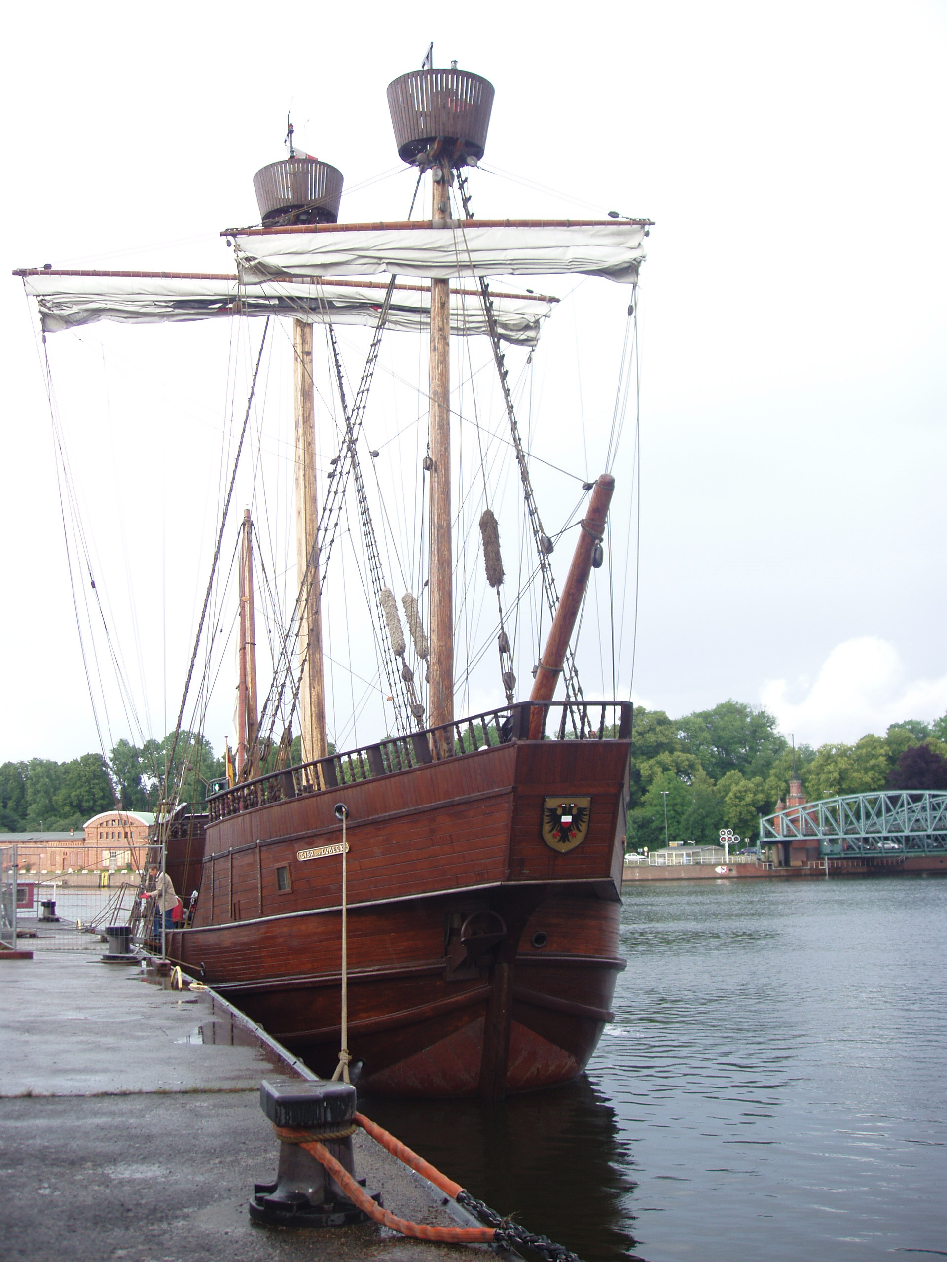 Kraweel „LISA von LÜBECK“ Länge ü.A. 35.9 m, Rumpflänge 30.12 m, Breite ü.A. 9.3 m, Tiefgang 2.86 m, Verdrängung 198 t, Länge des Großmastes 24 m Erbaut zwischen 1999 und 2004, Heimathafen Lübeck - [1]